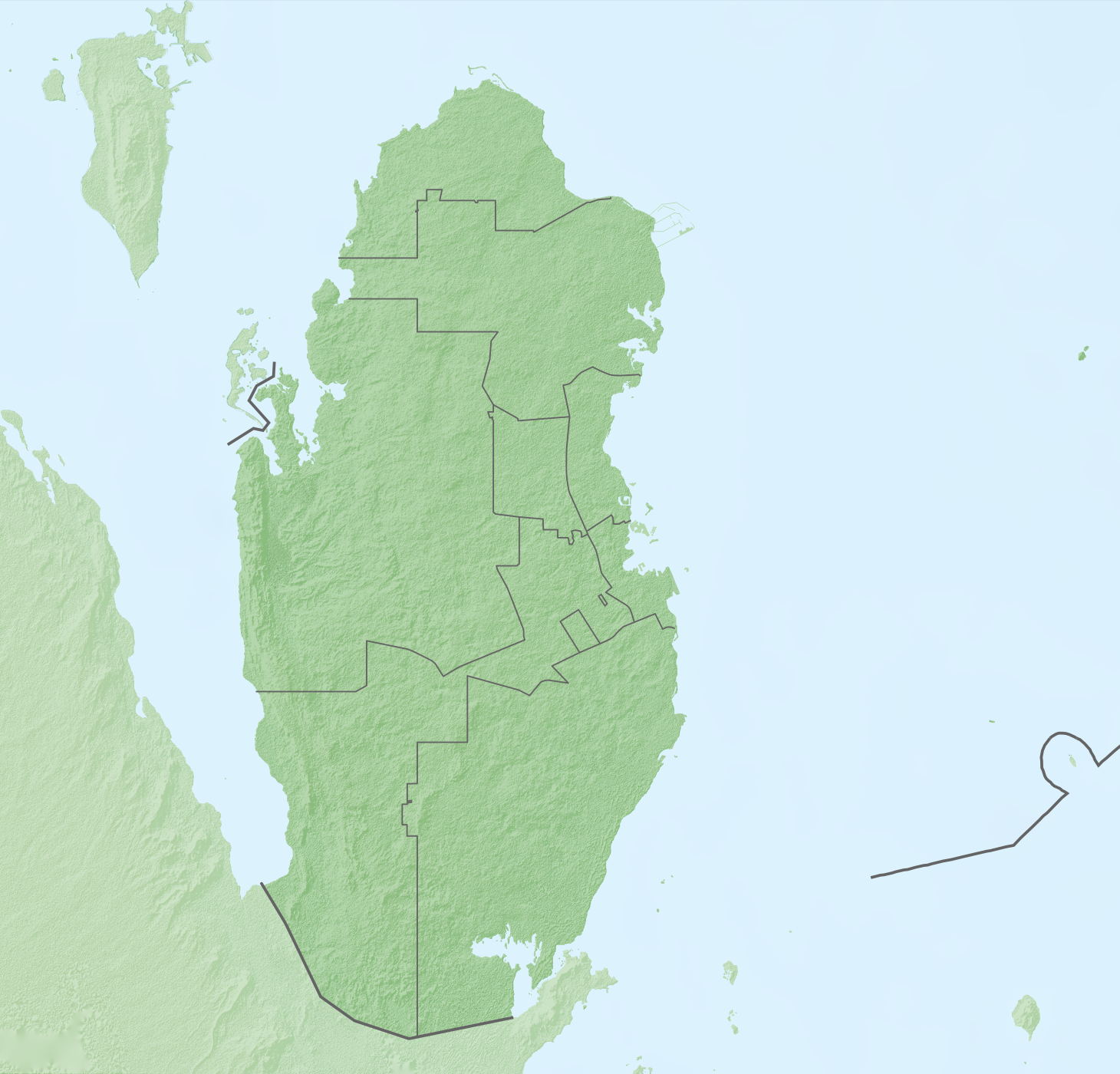 Reliefkarte Katar Topographischer Hintergrund: NASA Shuttle Radar Topography Mission (public domain). SRTM3 v.2. Grenzen: Qatar adm location map.svg